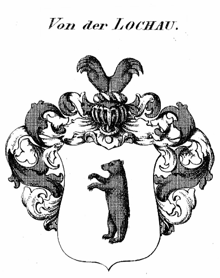 Wappen des Uradelsgeschlechts von der Lochau.